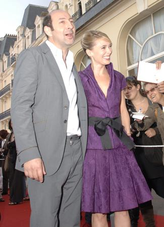 Kad Merad et Anne Marivin escortés par leurs garde du corps